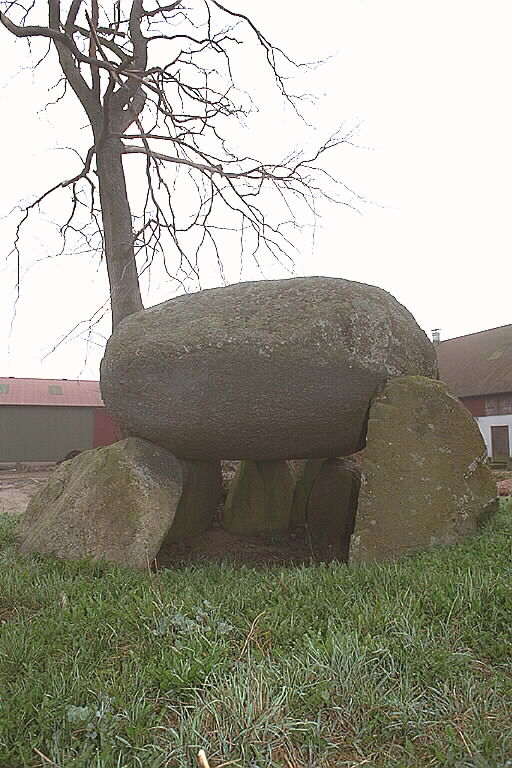 Dös. Motiv: Järrestad Kategori: Stenkammargrav Dös.